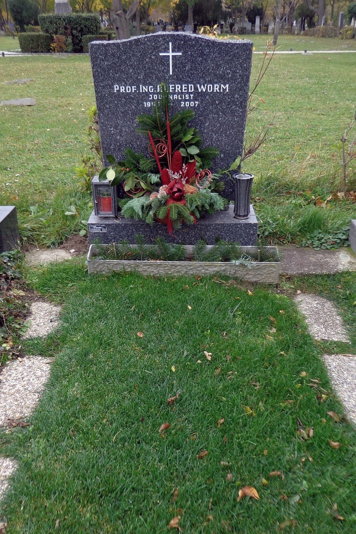 Wiener Zentralfriedhof - Gruppe 40: ehrenhalber gewidmetes Grab von Alfred Worm